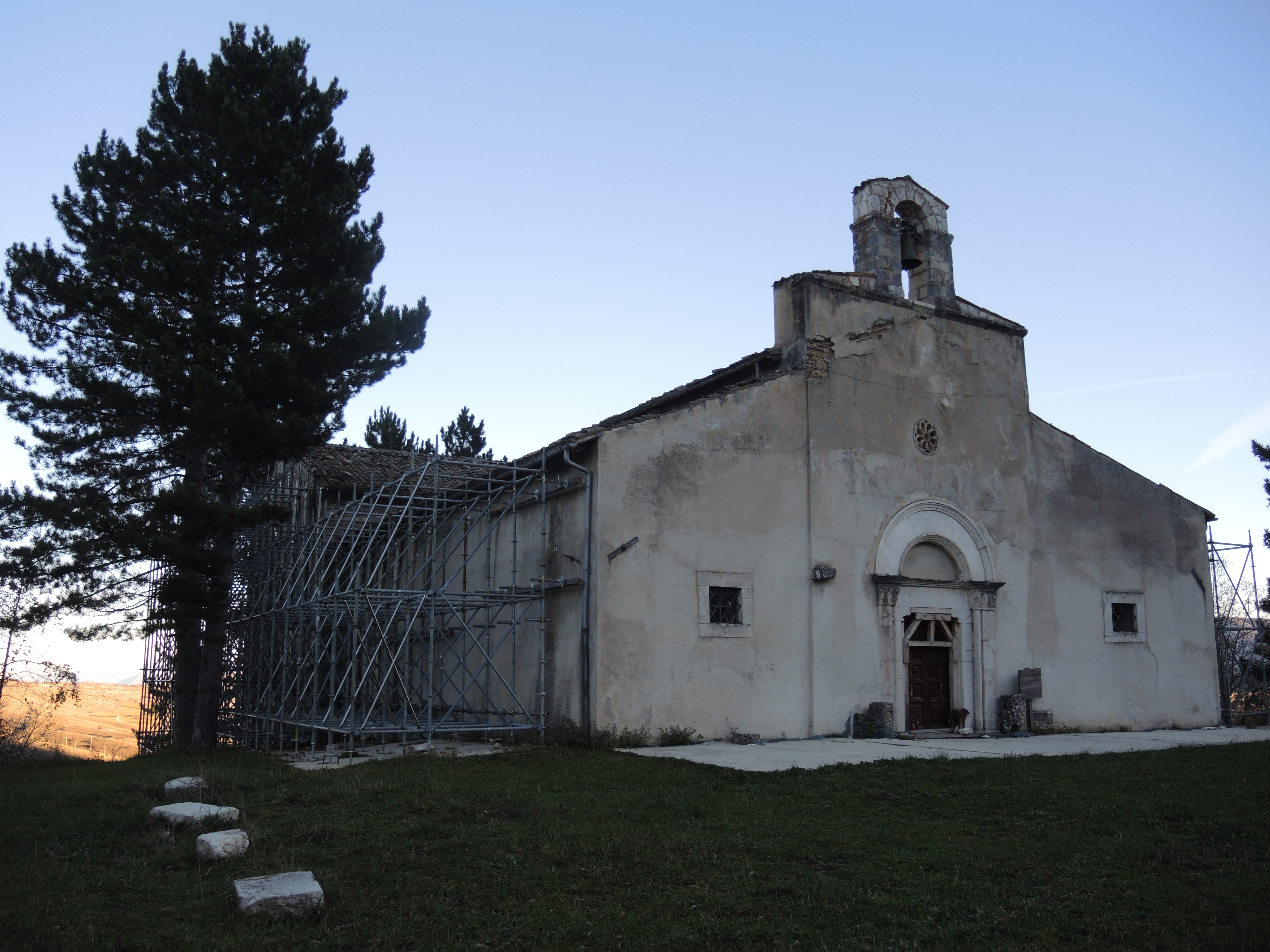 Abbazia di Santa Lucia a Rocca di Cambio (AQ)